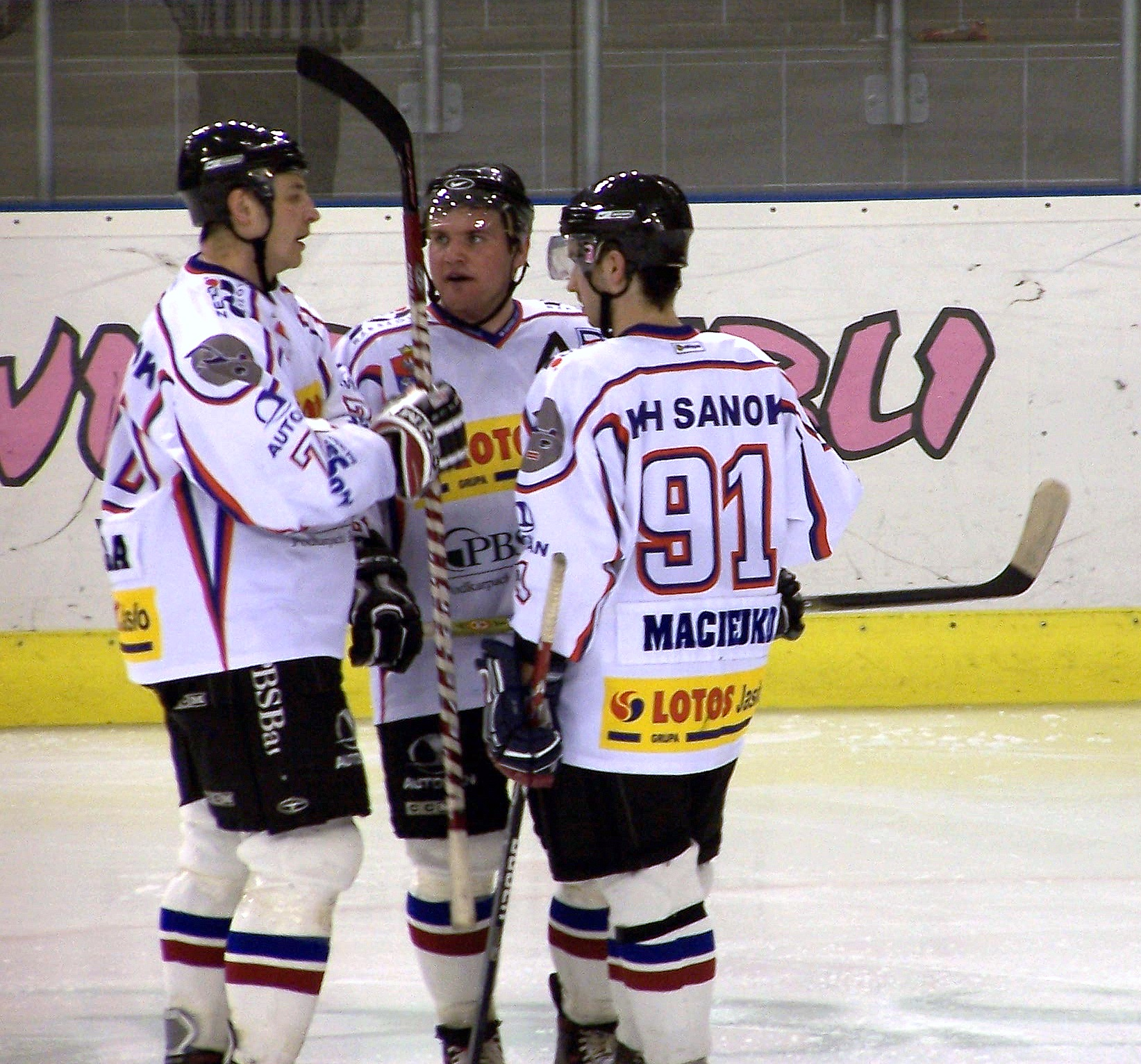 Bogusław Rąpała, Marcin Ćwikła i Adrian Maciejko podczas meczu KH Sanok z HK Trebiszów